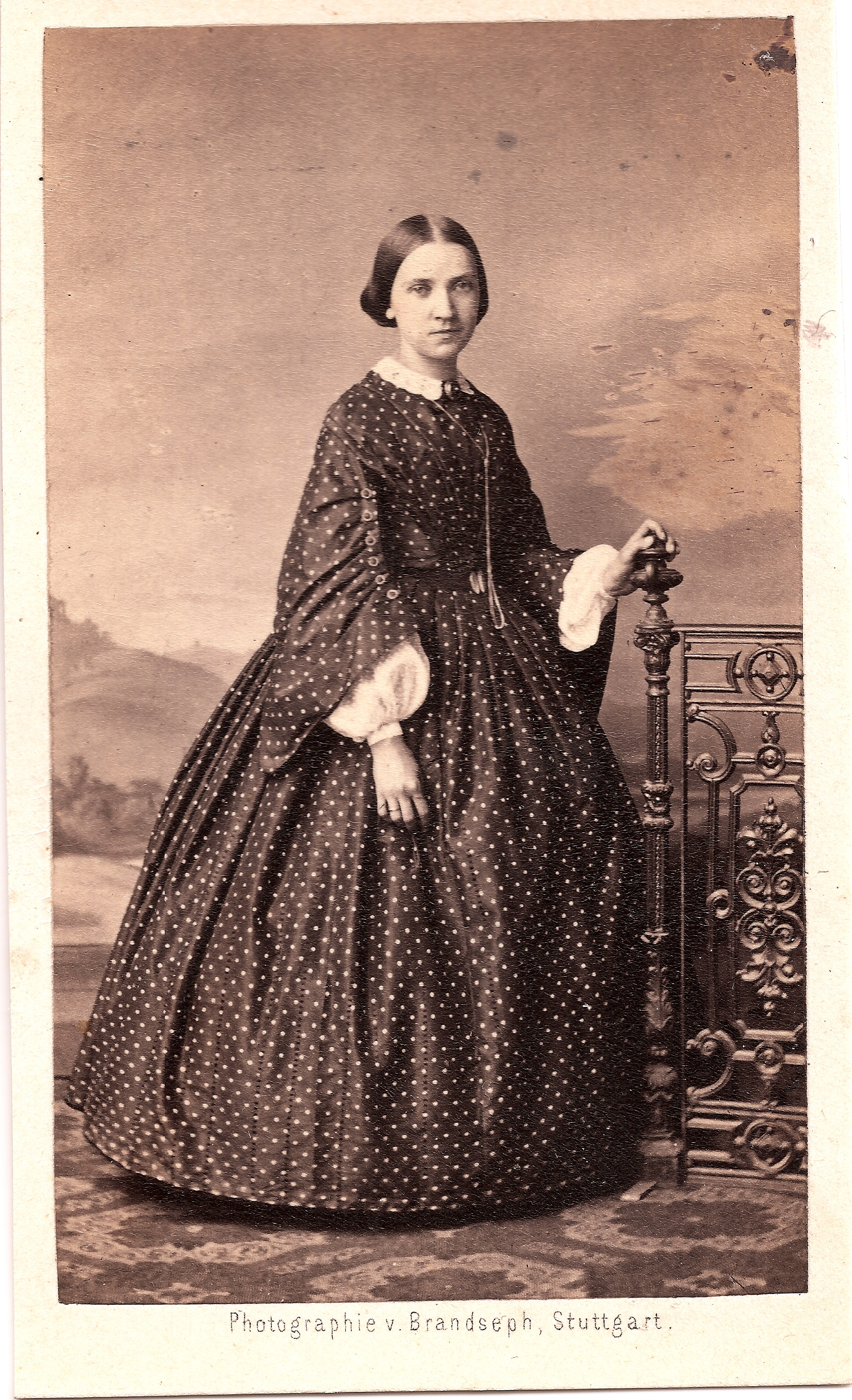 Theophanie Haug ∞ Karl von Riecke, Fotografie, Albuminpapier